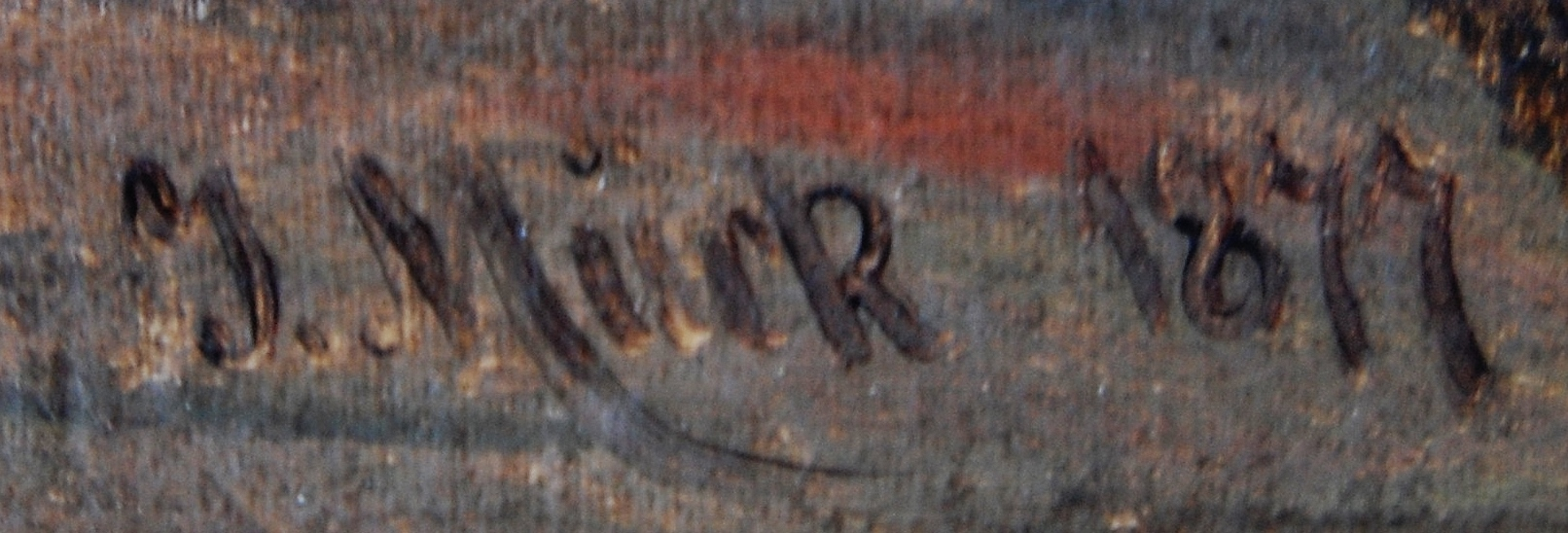 Signatur des deutsch-dänischen Malers Johannes Mück (1831-1919) auf einem Landschaftsgemälde von 1877